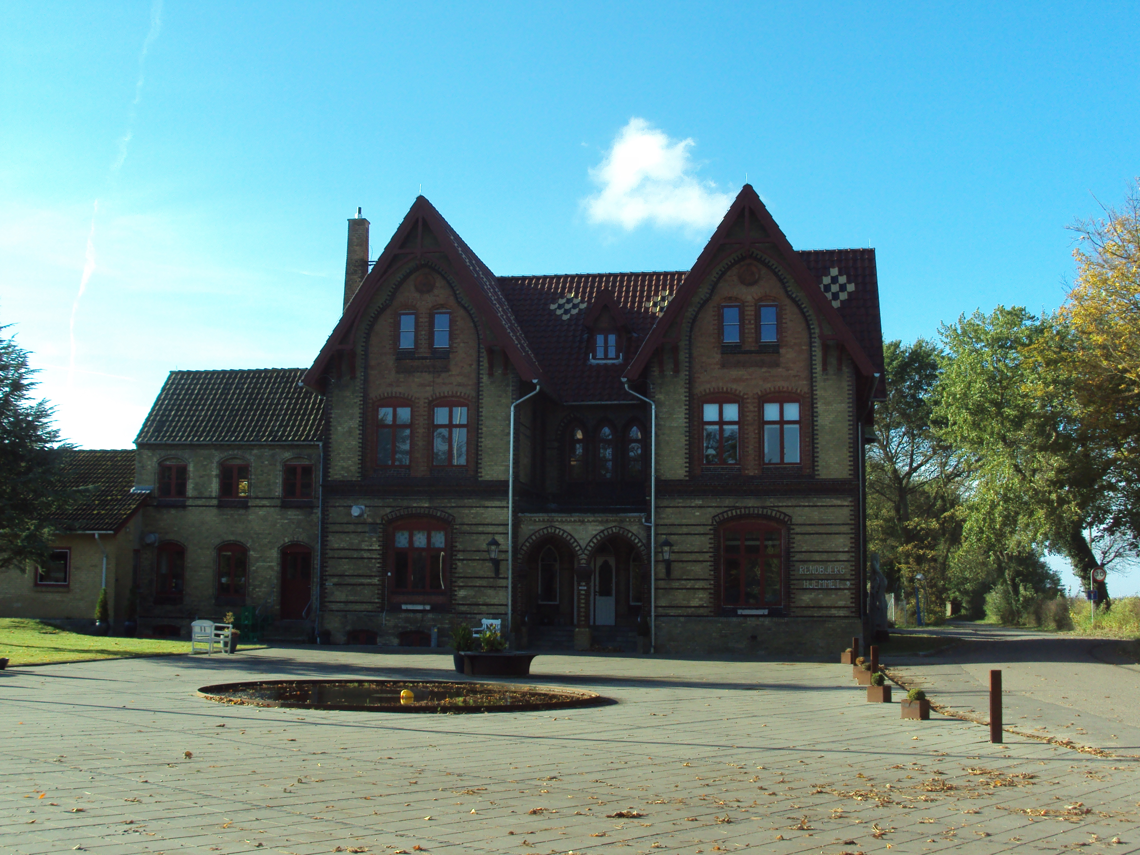 Rendbjerghjemmet (tidl. kaldet Rendbjerg Slot) ved Egernsund.